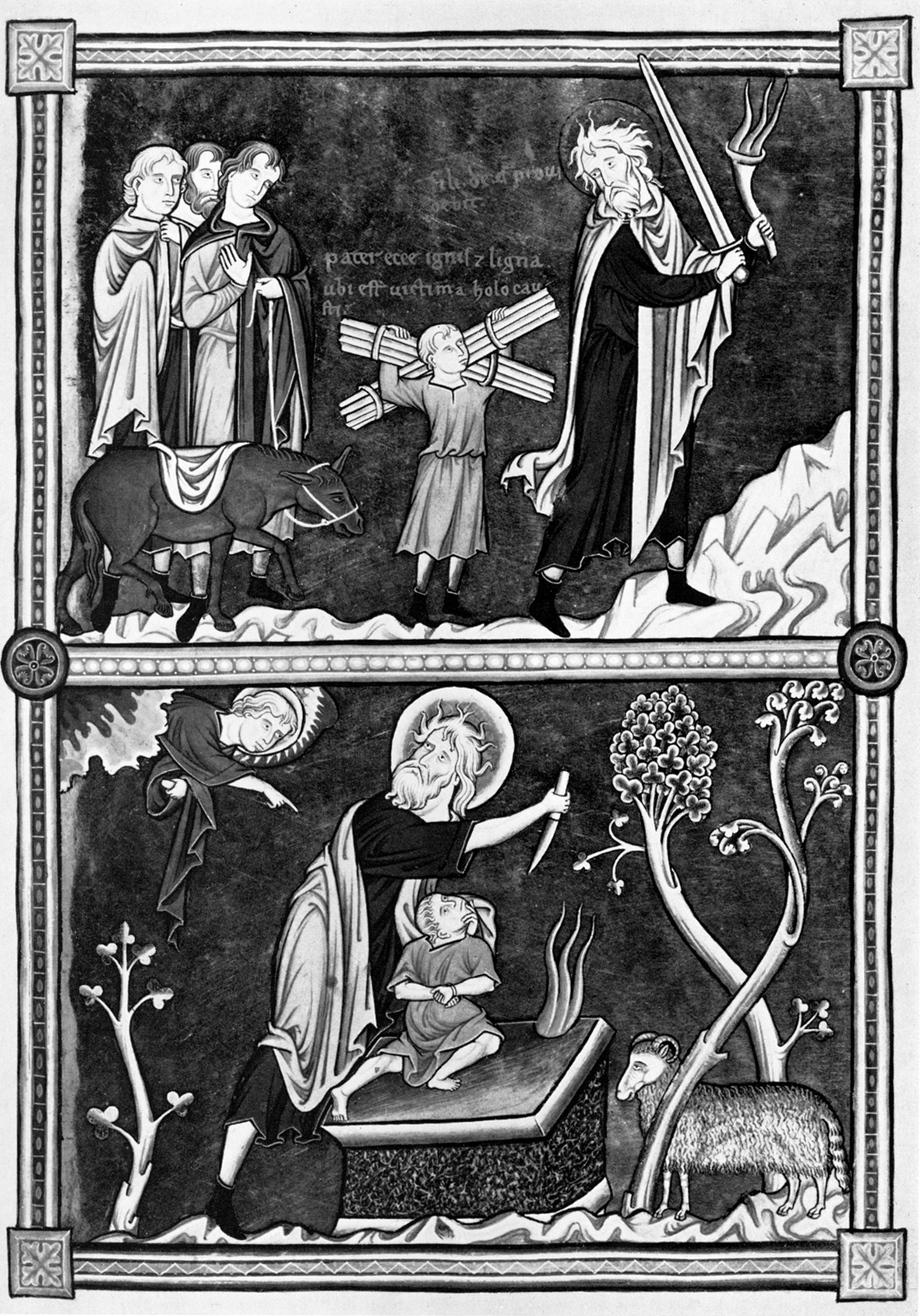 Abraham and Isaak, aus dem Ingeborg-Psalter.